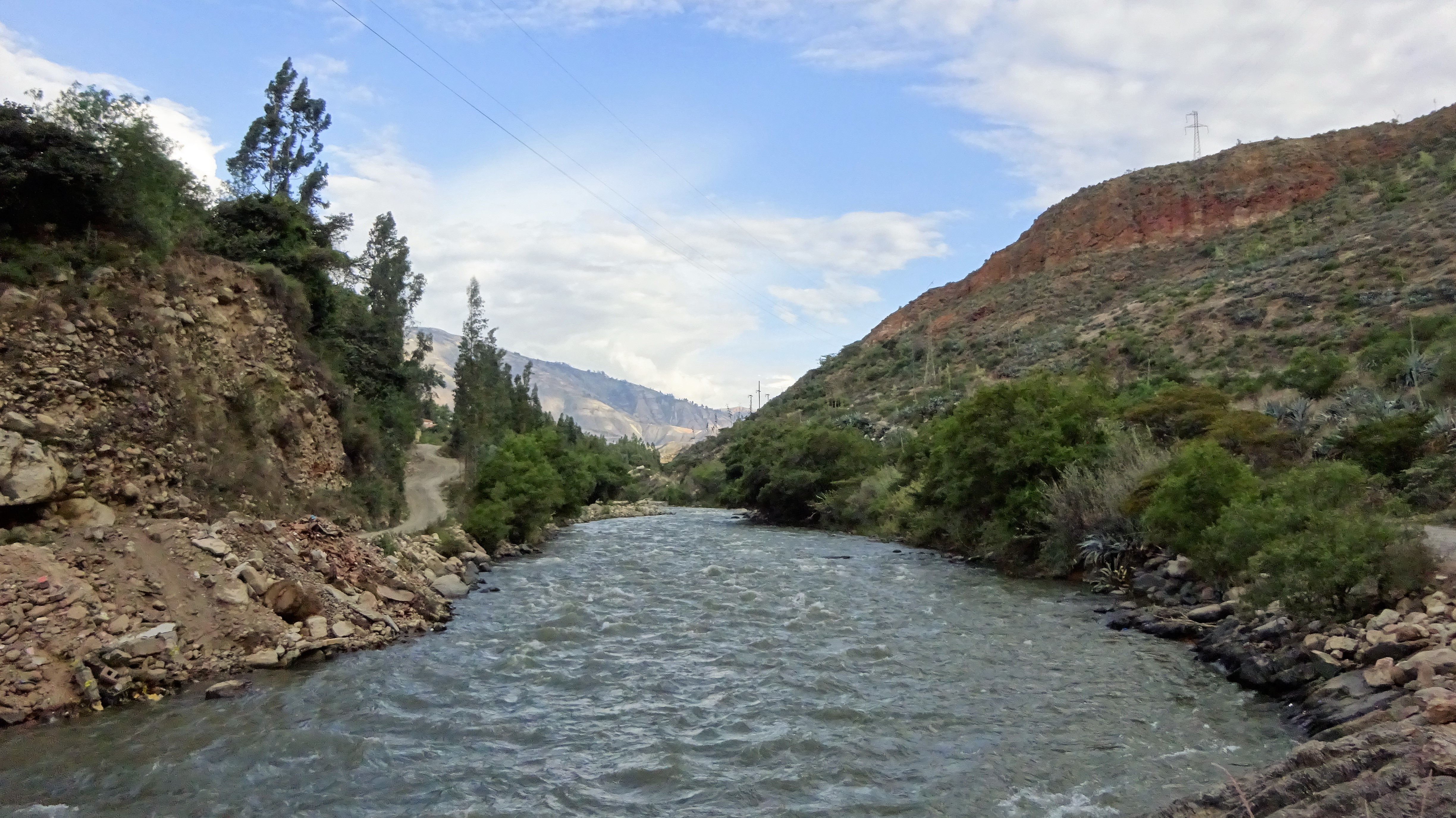 Der Rio Santa im Callejon de Huaylaz nahe der Stadt Caraz